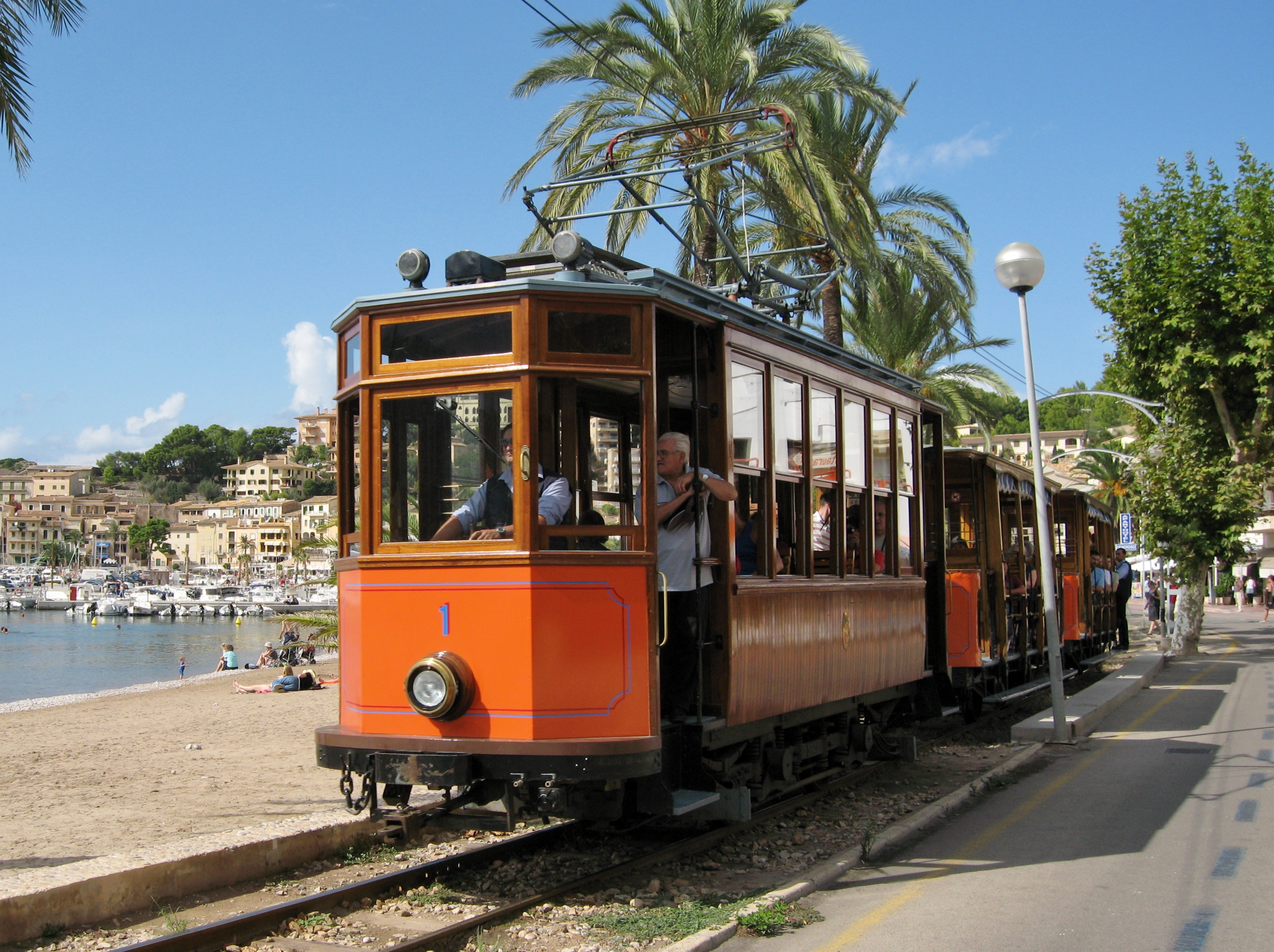 Port de Sóller, Gemeinde Sóller, Mallorca, Spanien